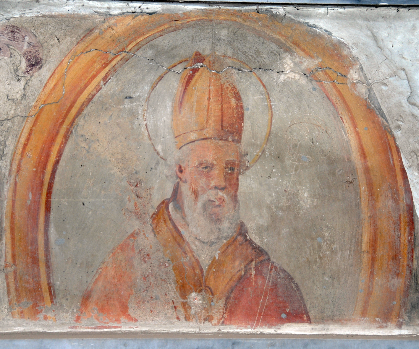 Affresco del Santo Ferdindo di Aragona presso Santa Maria di Cubulteria, Alvignano